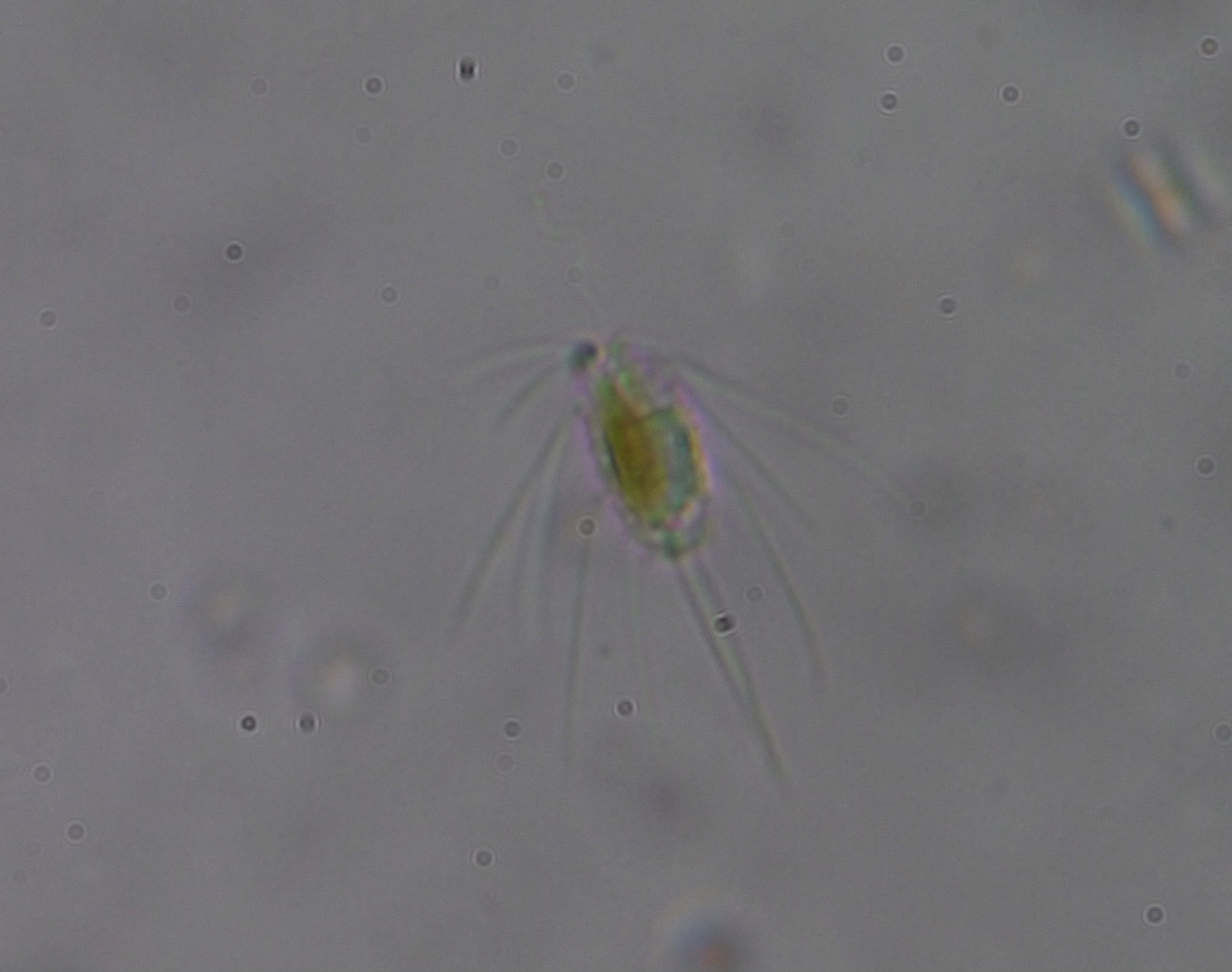 Ｍａｌｌｏｍｏｎａｓ ｓｐ．：ミノヒゲムシの１種 2015/01/30 和歌山県田辺市：Tanabe City. Wakayama Pref. Japan